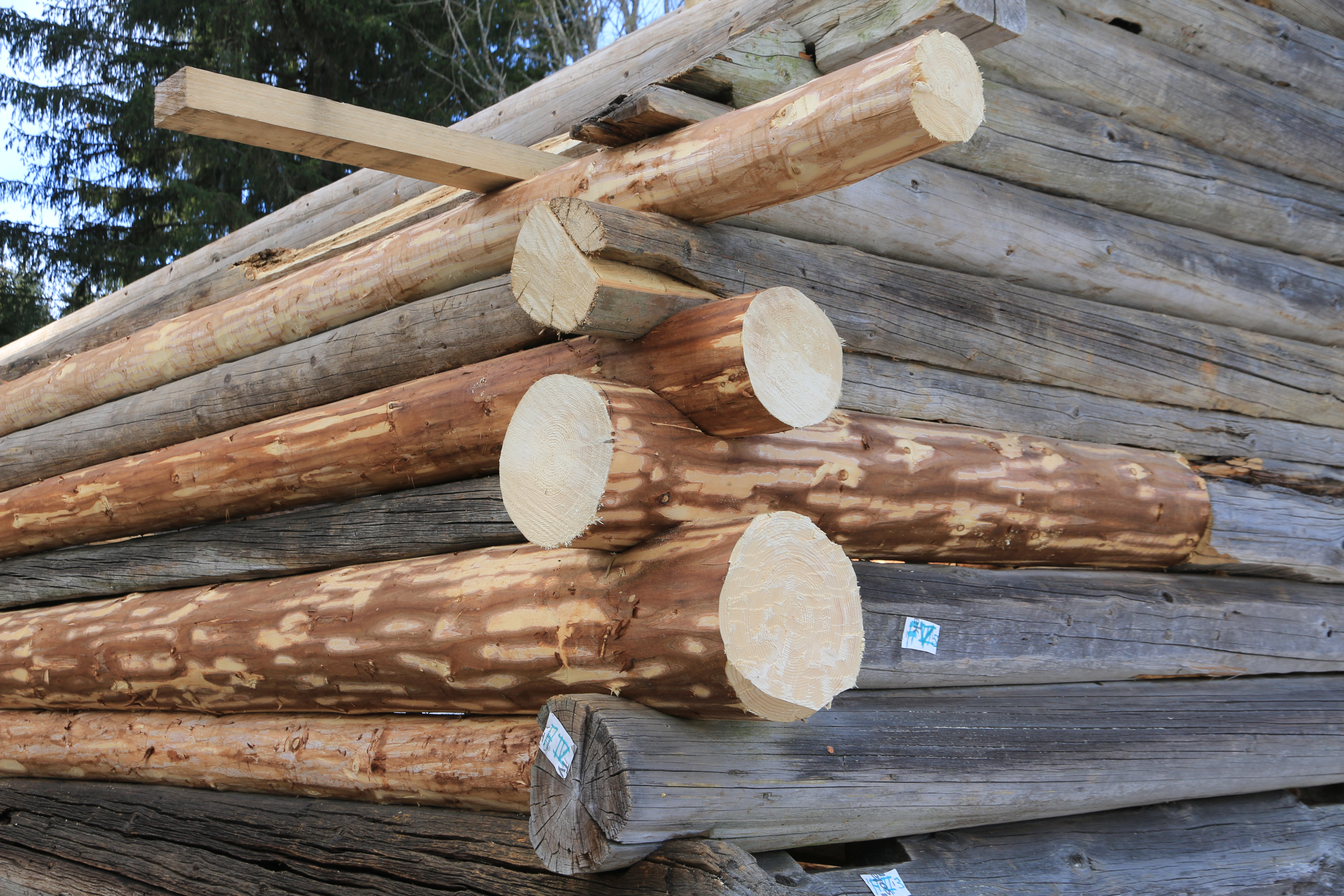 Restaurering og utskifting av stokker ved laftet seterbygning på Eiktunet friluftsmuseum ved Gjøvik, Norge. Sommerfjøset er bygget av luselaft, den enkleste formen for lafting, og ble gjerne benyttet ved løer og sommerfjøs.